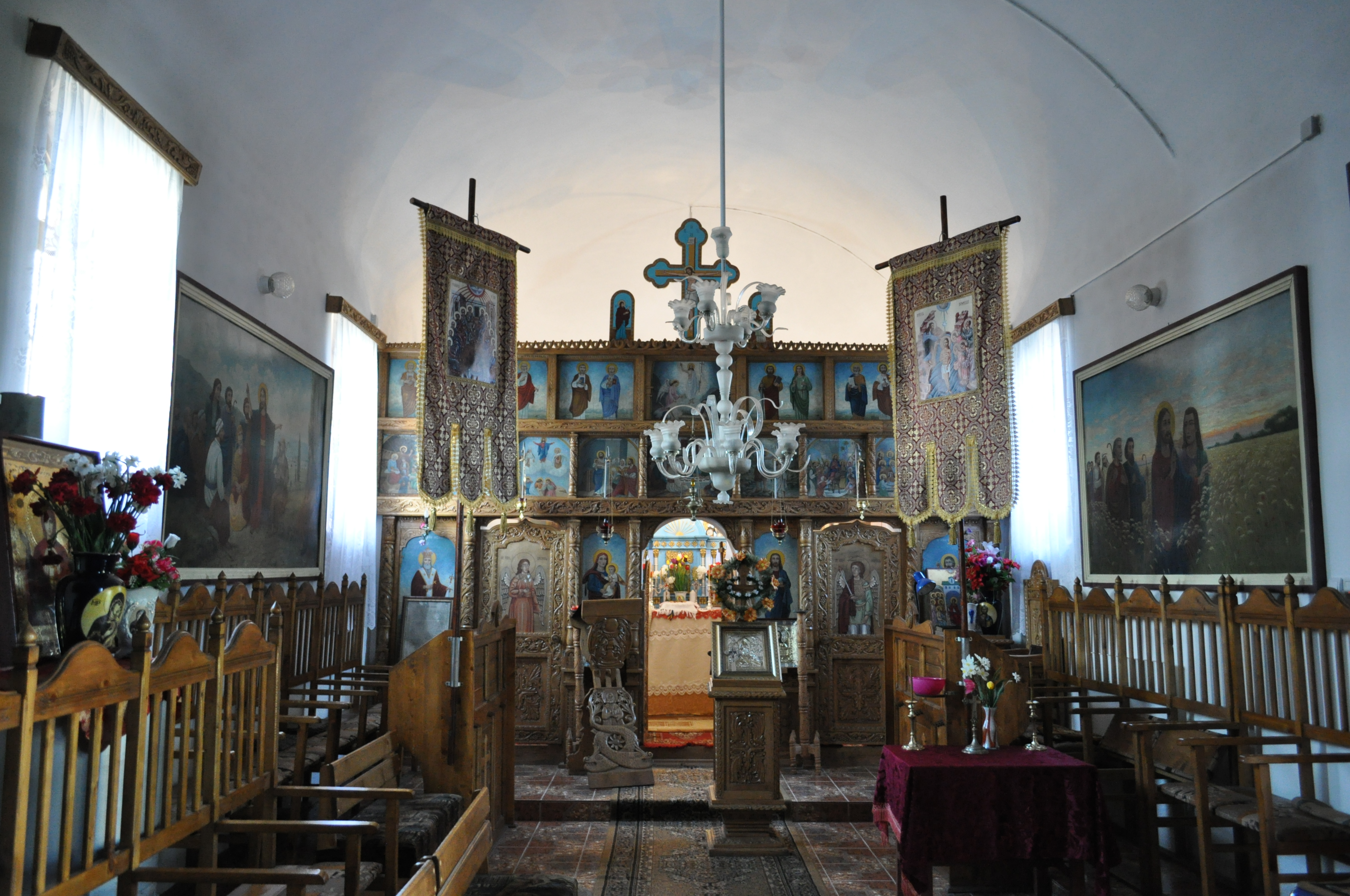 Biserica "Pogorârea Sfântului Duh", sat OSTROV; comuna RÂU DE MORI 01